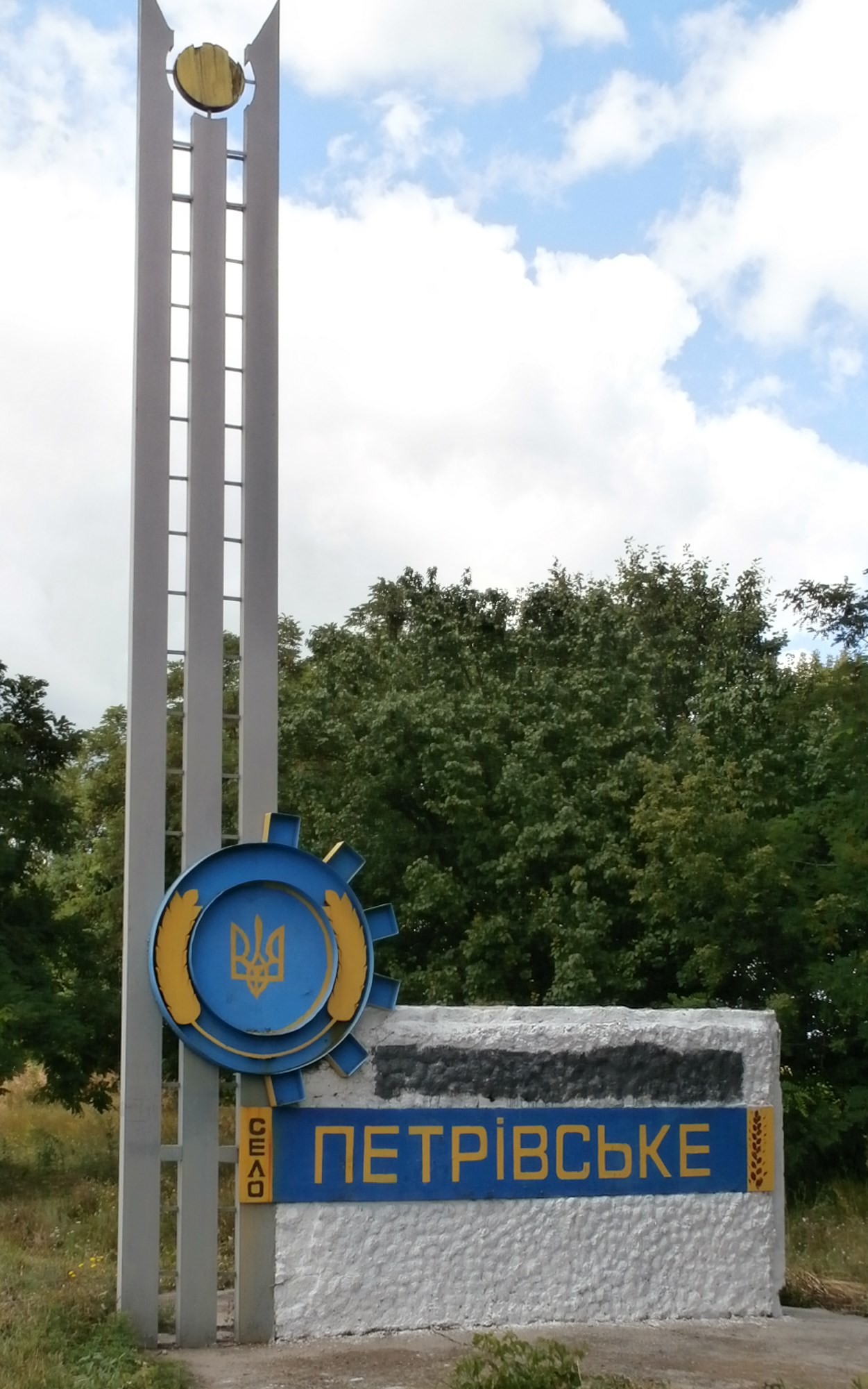 Ortsschild Petriwske